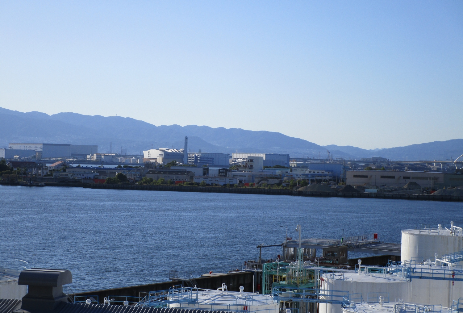 正蓮寺川（此花大橋の螺旋階段より撮影）